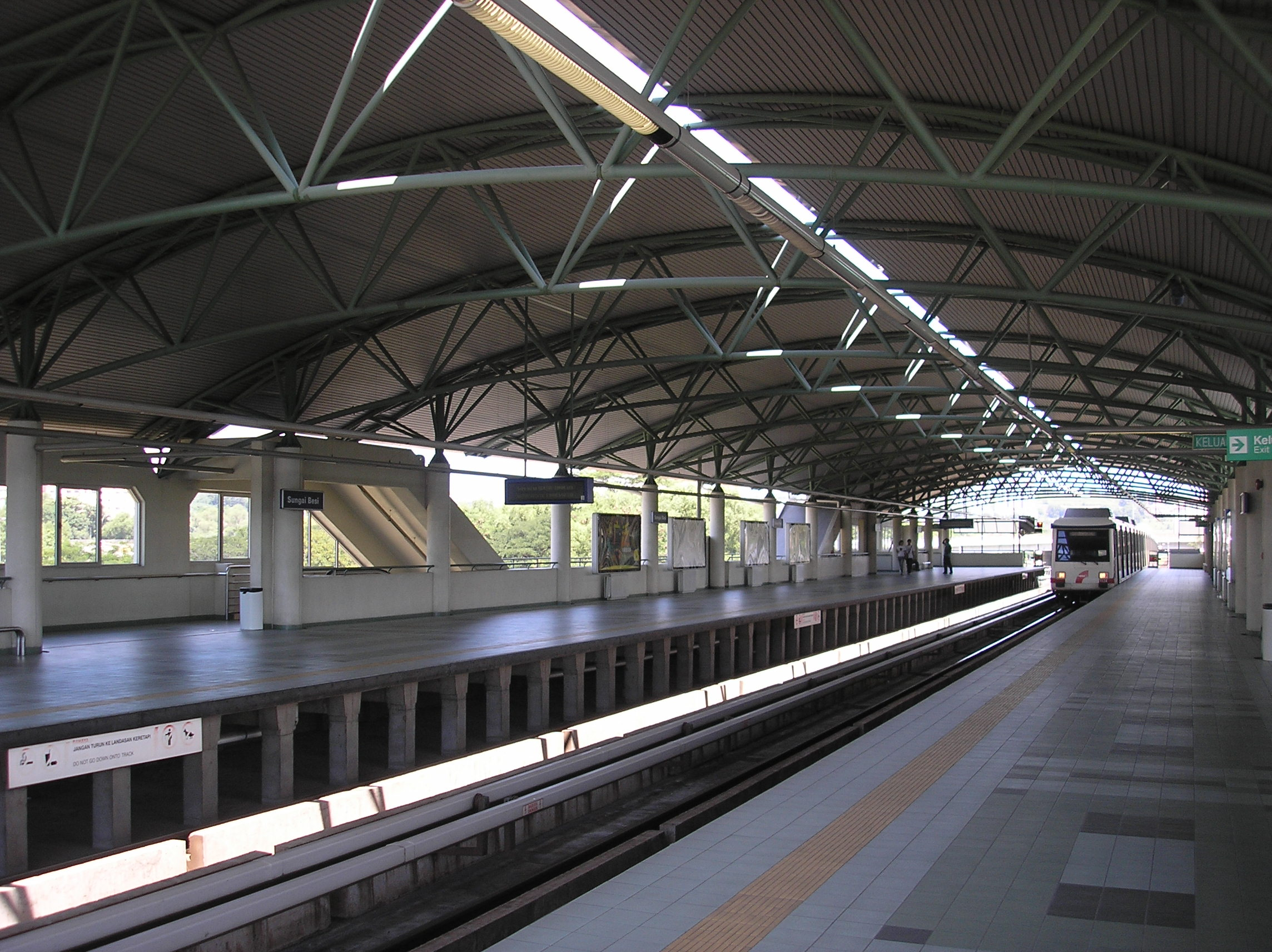 The Sungai Besi LRT station (Sri Petaling Line), Sungai Besi, Kuala Lumpur, Malaysia.